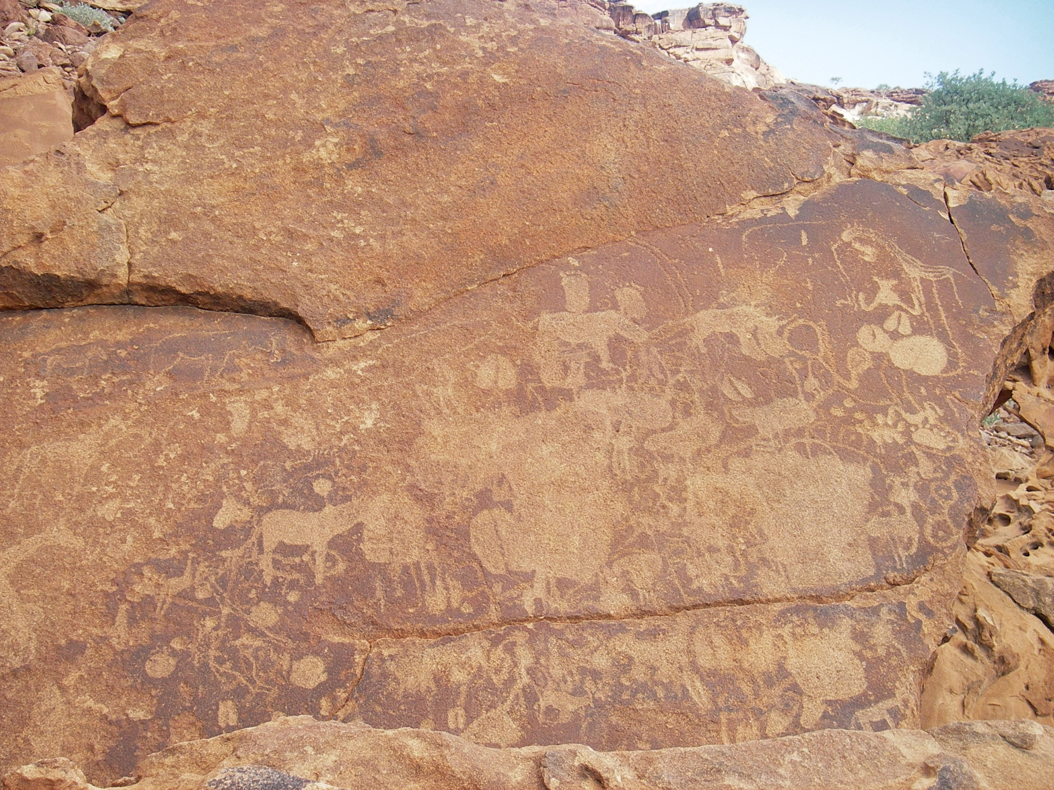 Rock Paintig Twyfelfontein